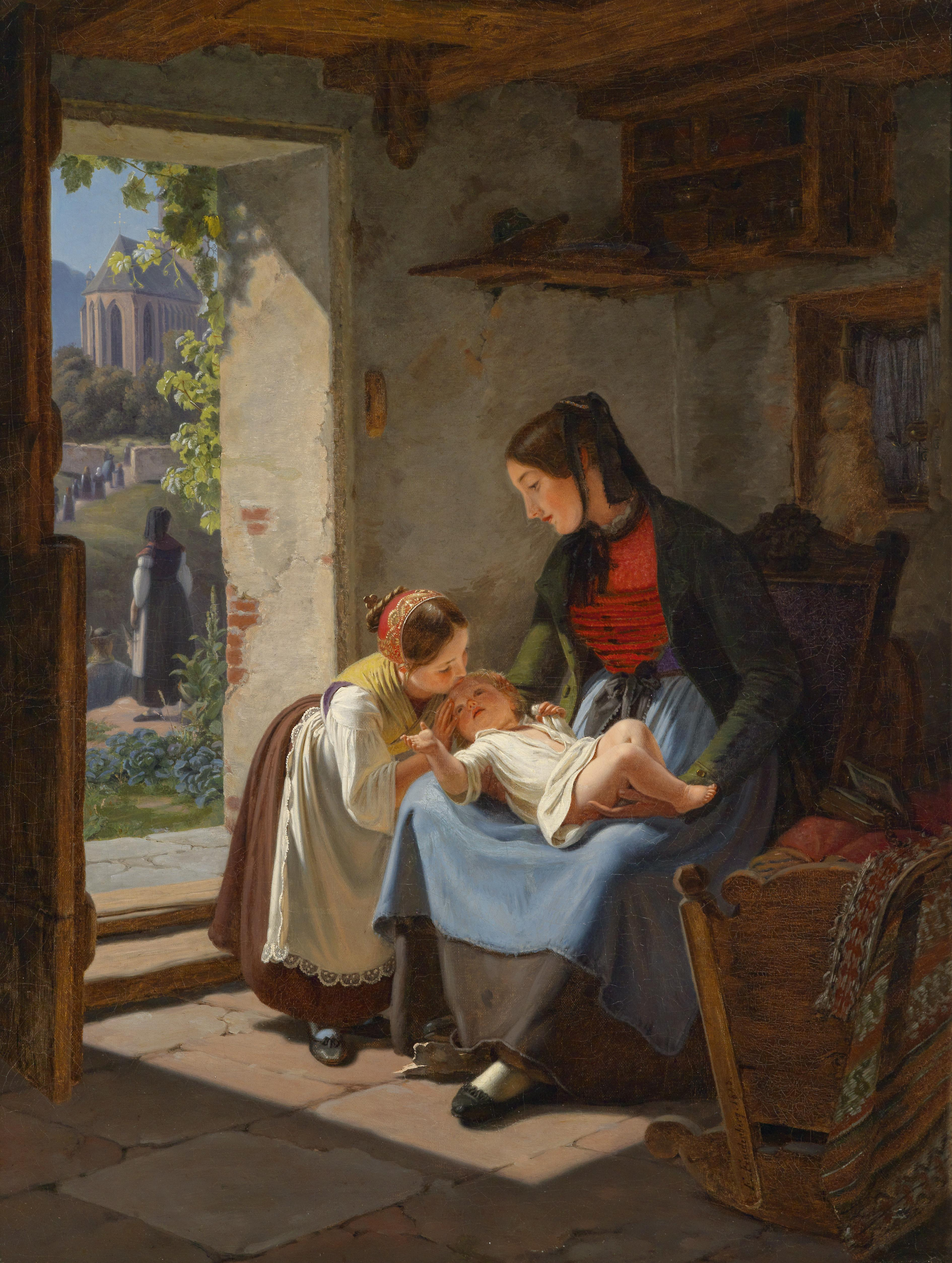 Mutterglück, signiert, datiert E. Freudenberg 1843, Öl auf Leinwand, 84,5 x 64 cm